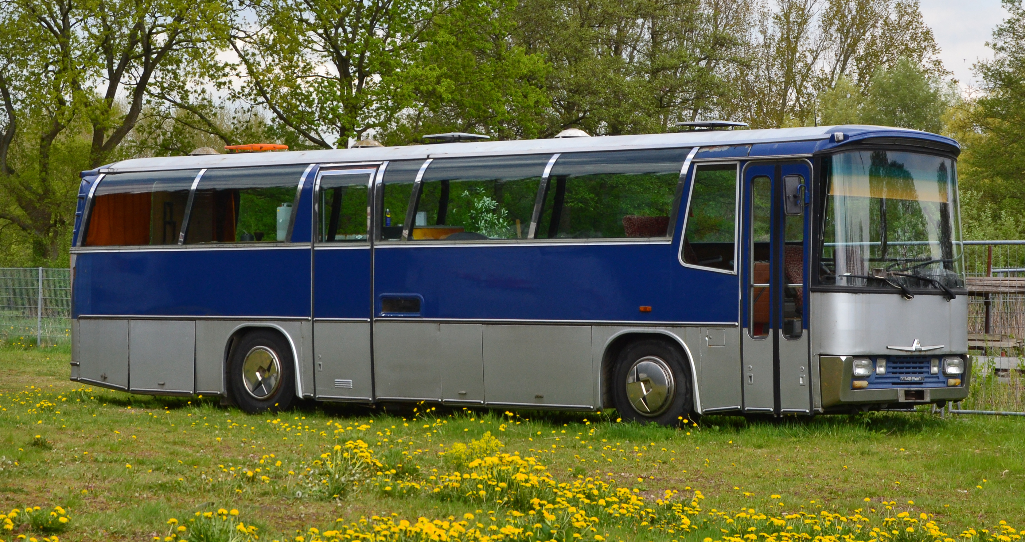 Neoplan Jetliner Bus in Uetersen.